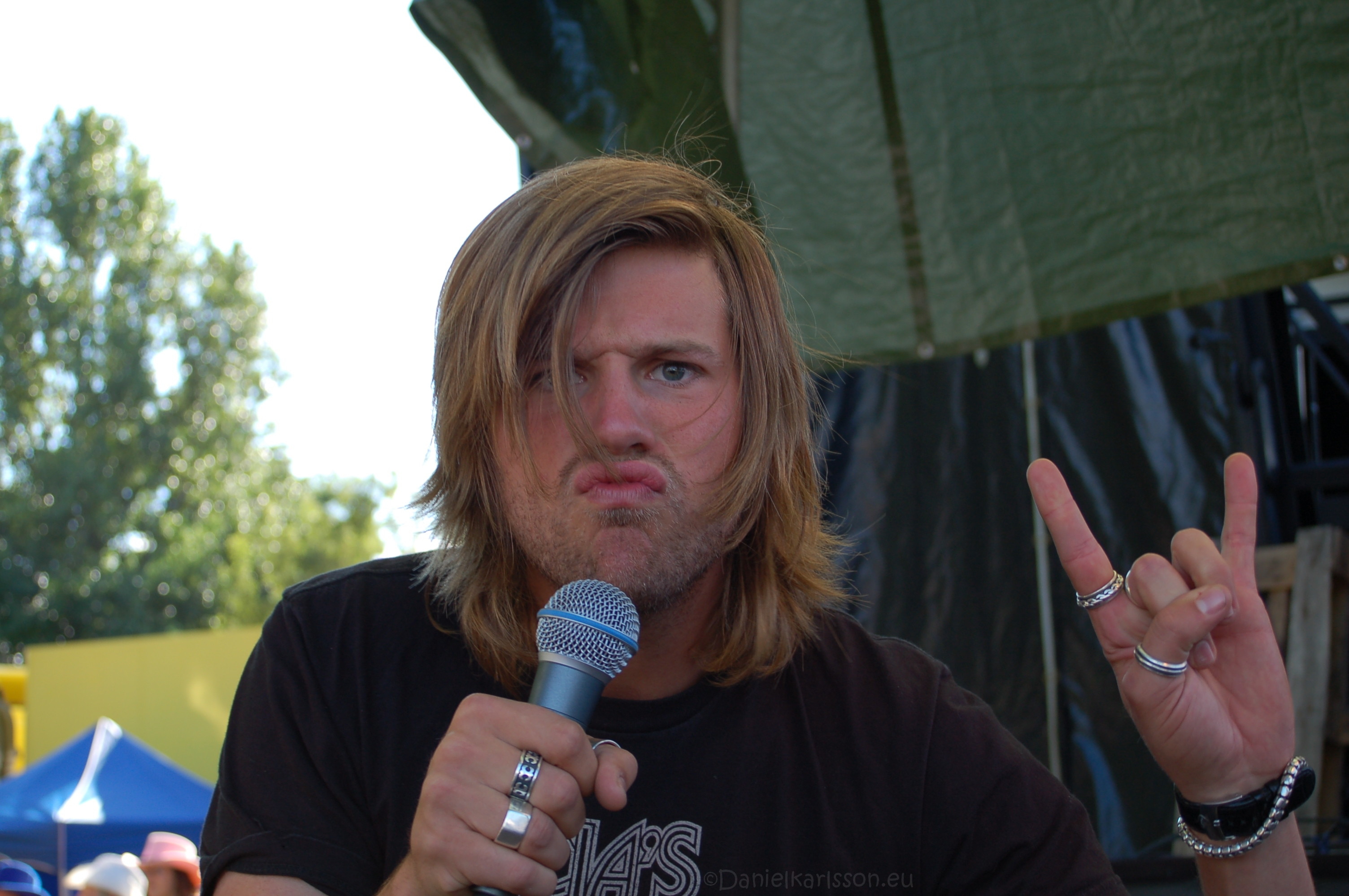 Anton Körberg i Norrköping (son till Tommy Körberg.) Foto: Daniel Åhs Karlsson